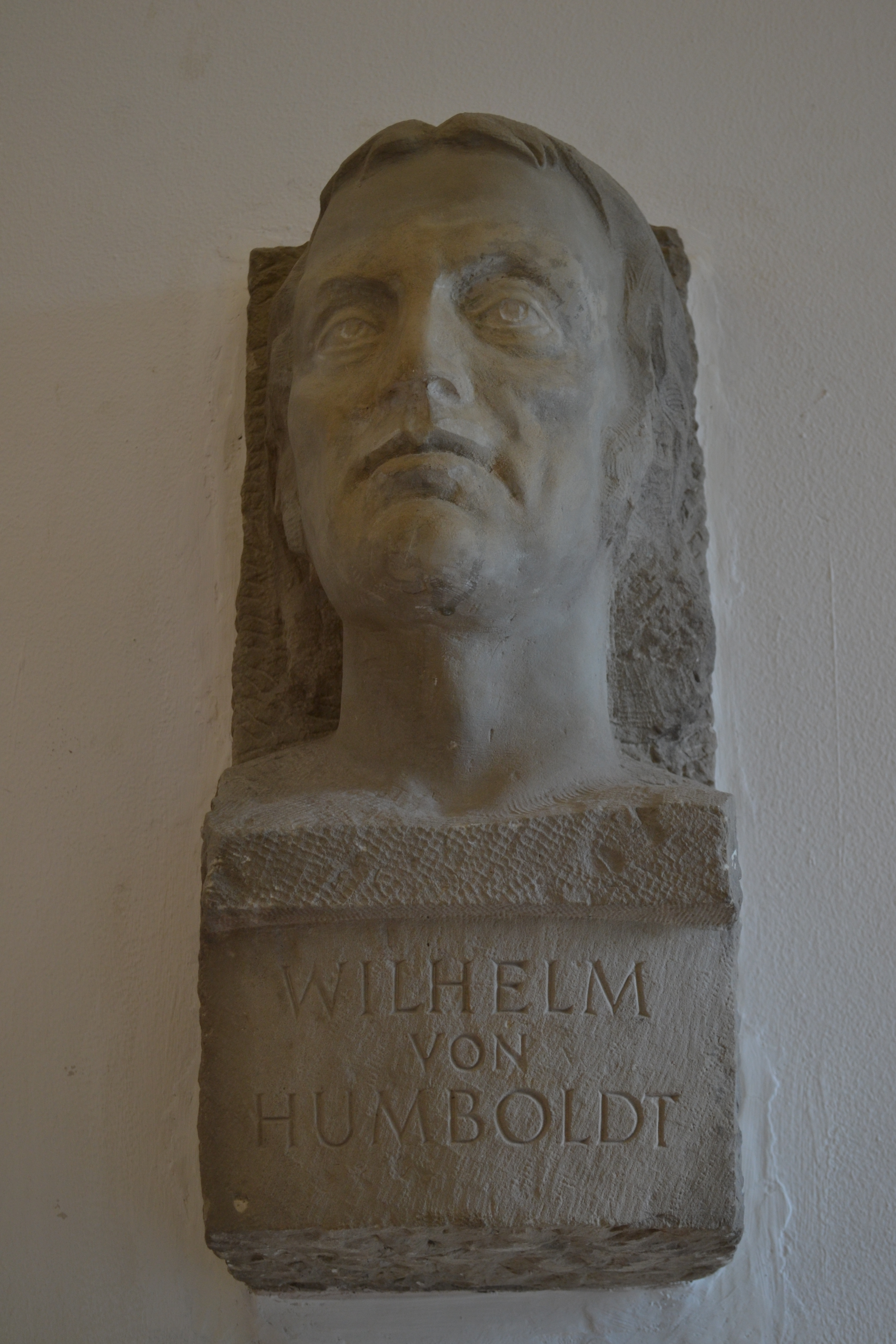 Gipsbüste "Wilhelm von Humboldt" von Ivo Beucker (1955) Aula des Humboldt-Gymnasiums Düsseldorf